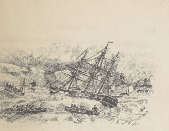 L'aviso Le Milan à Terre-Neuve commandé par l'amiral Georges-Charles Cloué (1817-1889) ; gravure d' Ernest Langlois et Ginos in Nos marins : vice-amiraux, contre-amiraux, officiers généraux des troupes de la marine et des corps entretenus d' Étienne Tréfeu 1888 (BNF/Gallica)